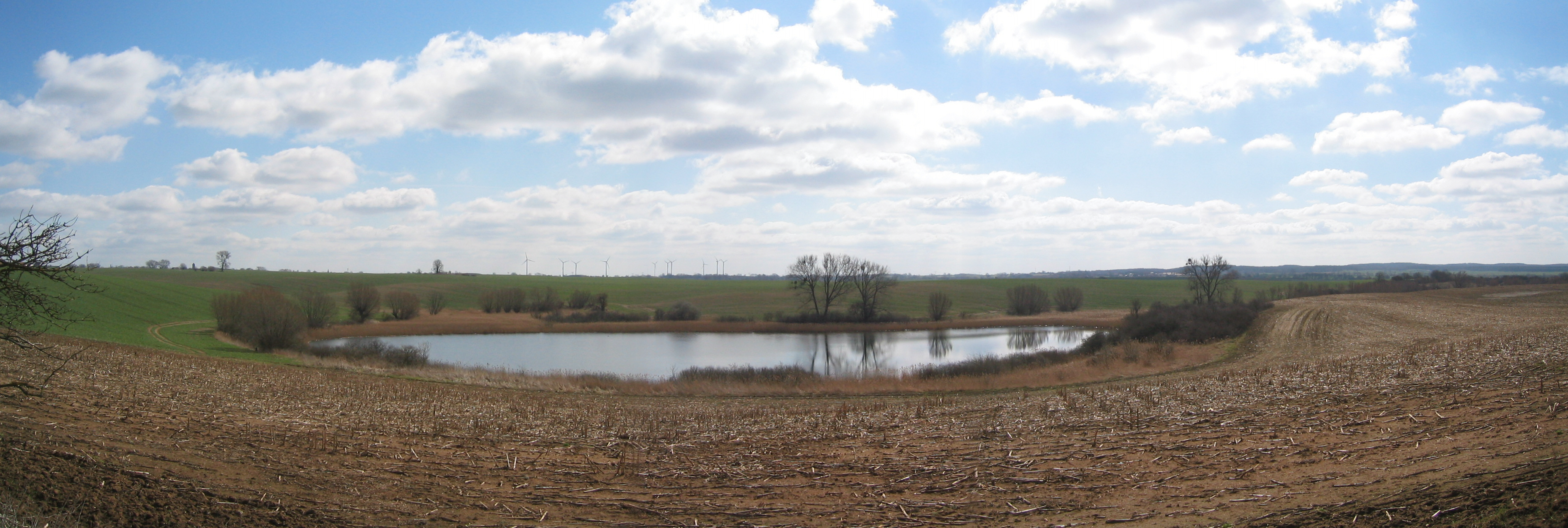 Krebssee in der Uckermark bei Berghausen.